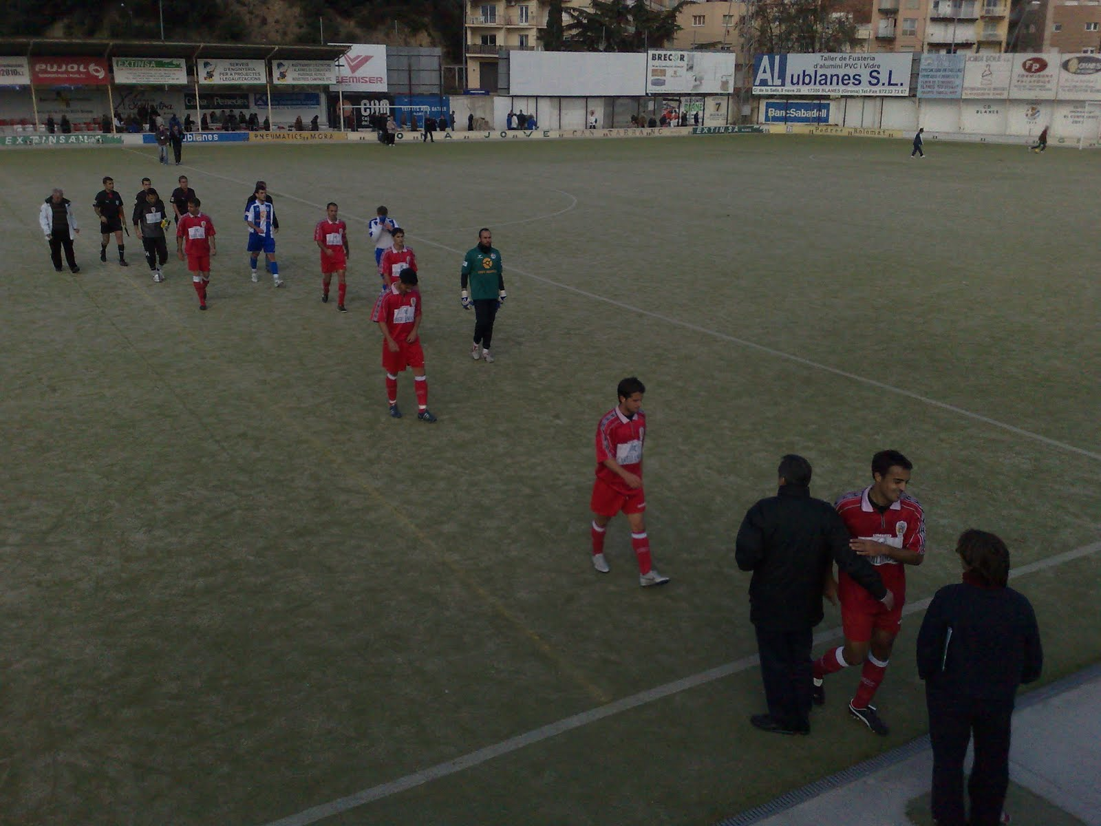 El Club Deportiu Blanes (camiseta blanquiazul) en el Camp Municipal dels Pins.